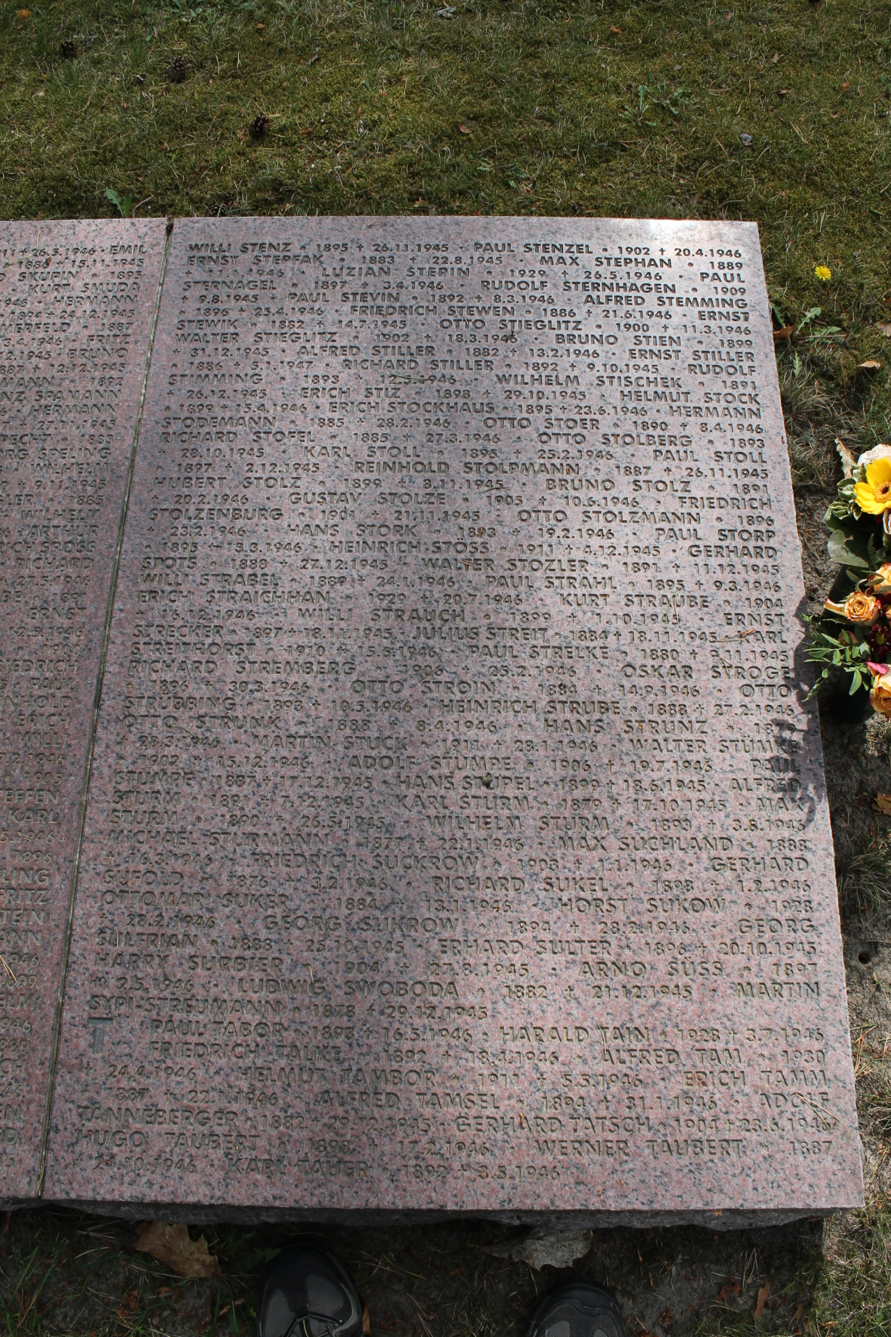 Namenplatten im Block 9 des Waldfriedhofs Halbe für ehemalige Häftlinge des Speziallagers Nr. 5.